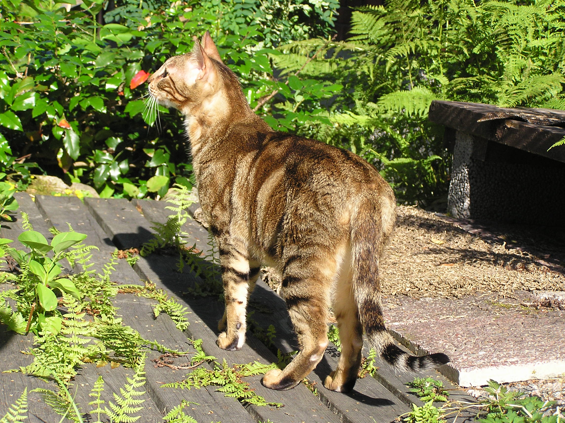 Sokoke, neutered male